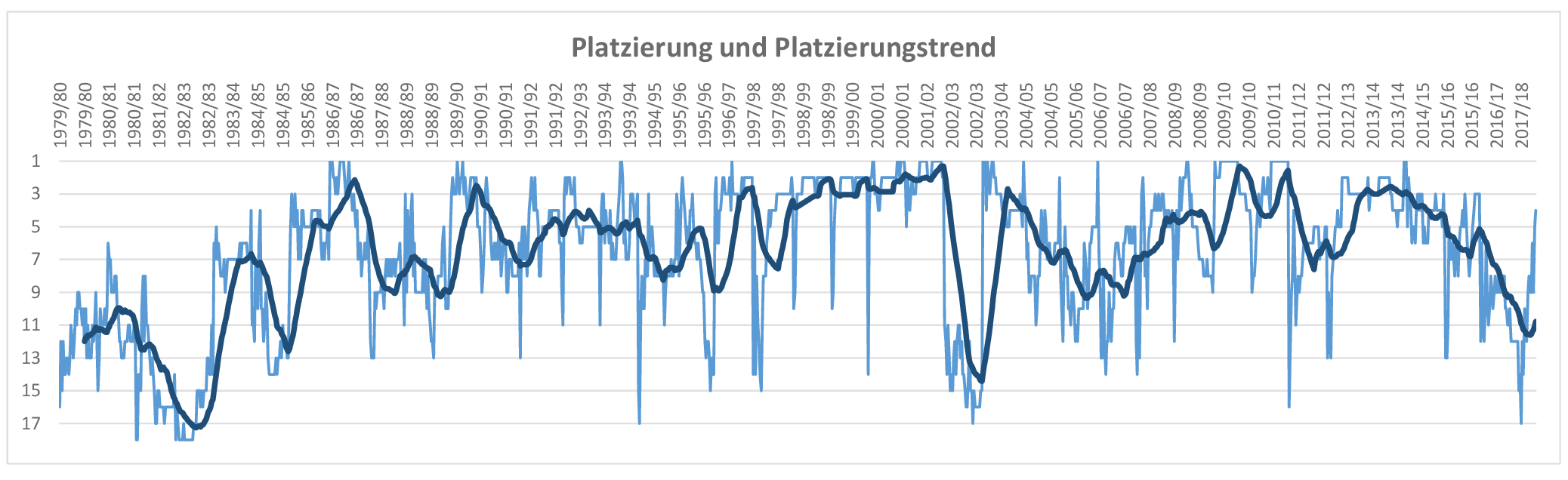 Platzierung Bayer 04 Leverkusens in der Fußball-Bundesliga (seit 1979)